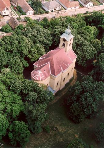 Lengyel, Hungary, aerialphotography. Ávilai Szent Teréz római katolikus templom